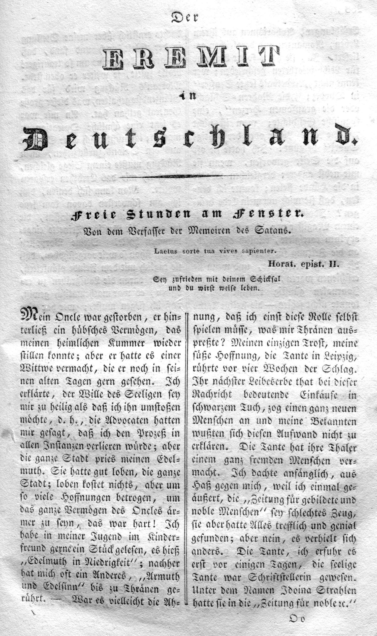 Titelseite von Wilhelm Hauffs Novelle „Freie Stunden am Fenster“ in der Zeitschrift „Der Eremit in Deutschland“, 1826.